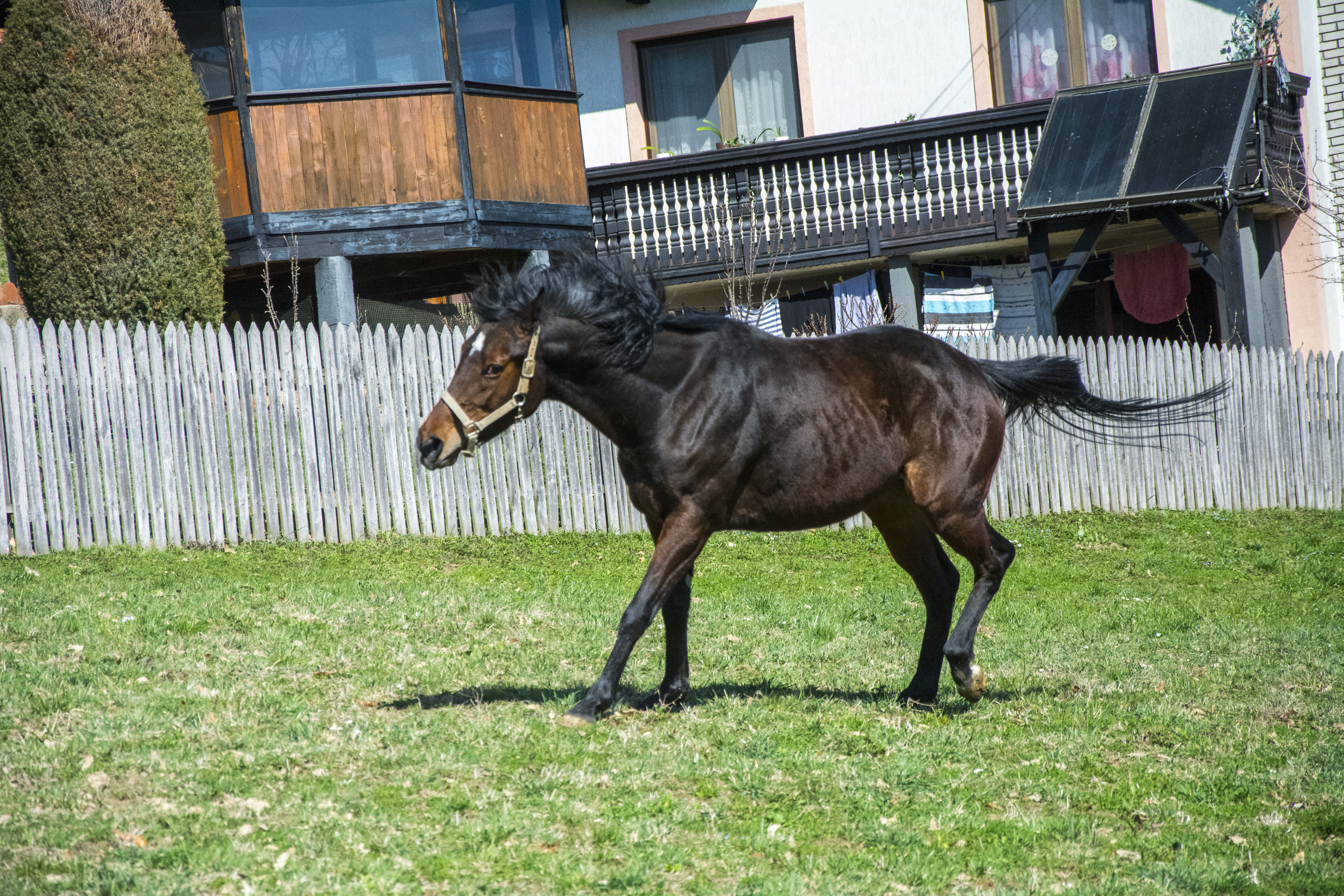 Енглески галопер на Еко Фарми Милановиц у Липовици